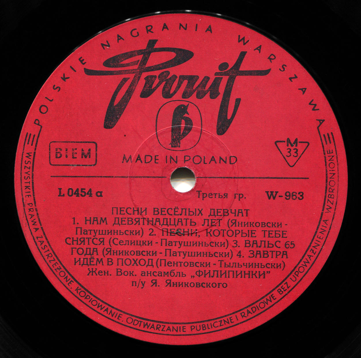 Etykieta albumu Filipinek „Rozśpiewani rówieśnicy” (strona A) w wersji eksportowej na rynek radziecki, 1965 r.